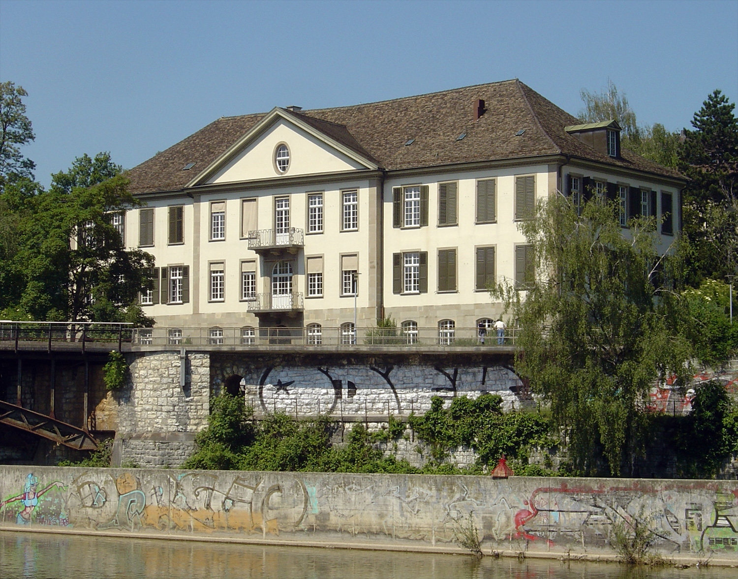 Die ehemalige Kattundruckerei von Johann Jakob Hofmeister im Letten in Zürich, errichtet 1782